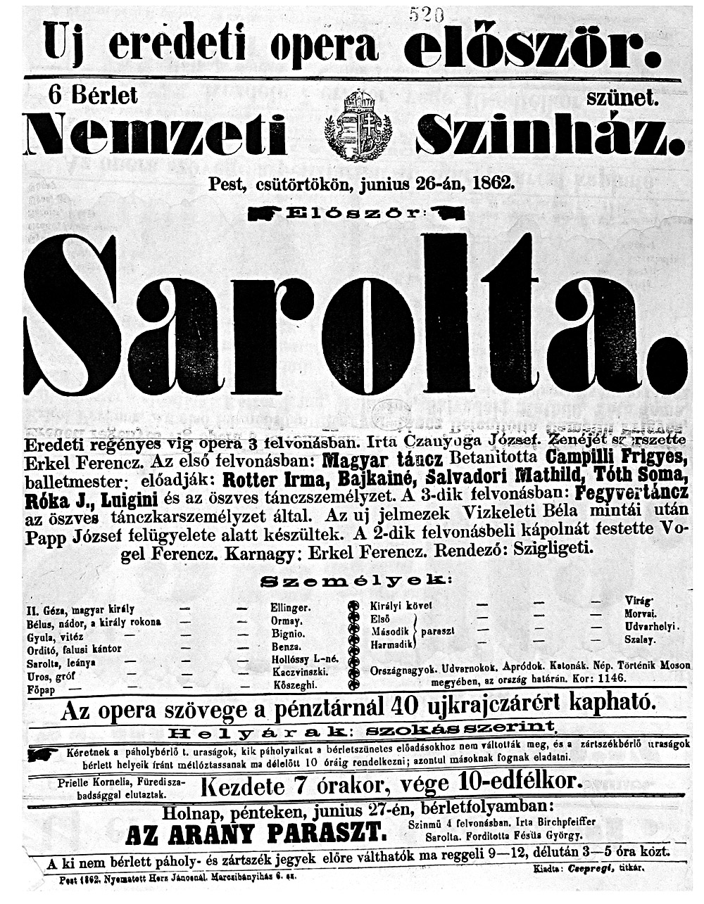 A Sarolta ősbemutatójának plakátja.